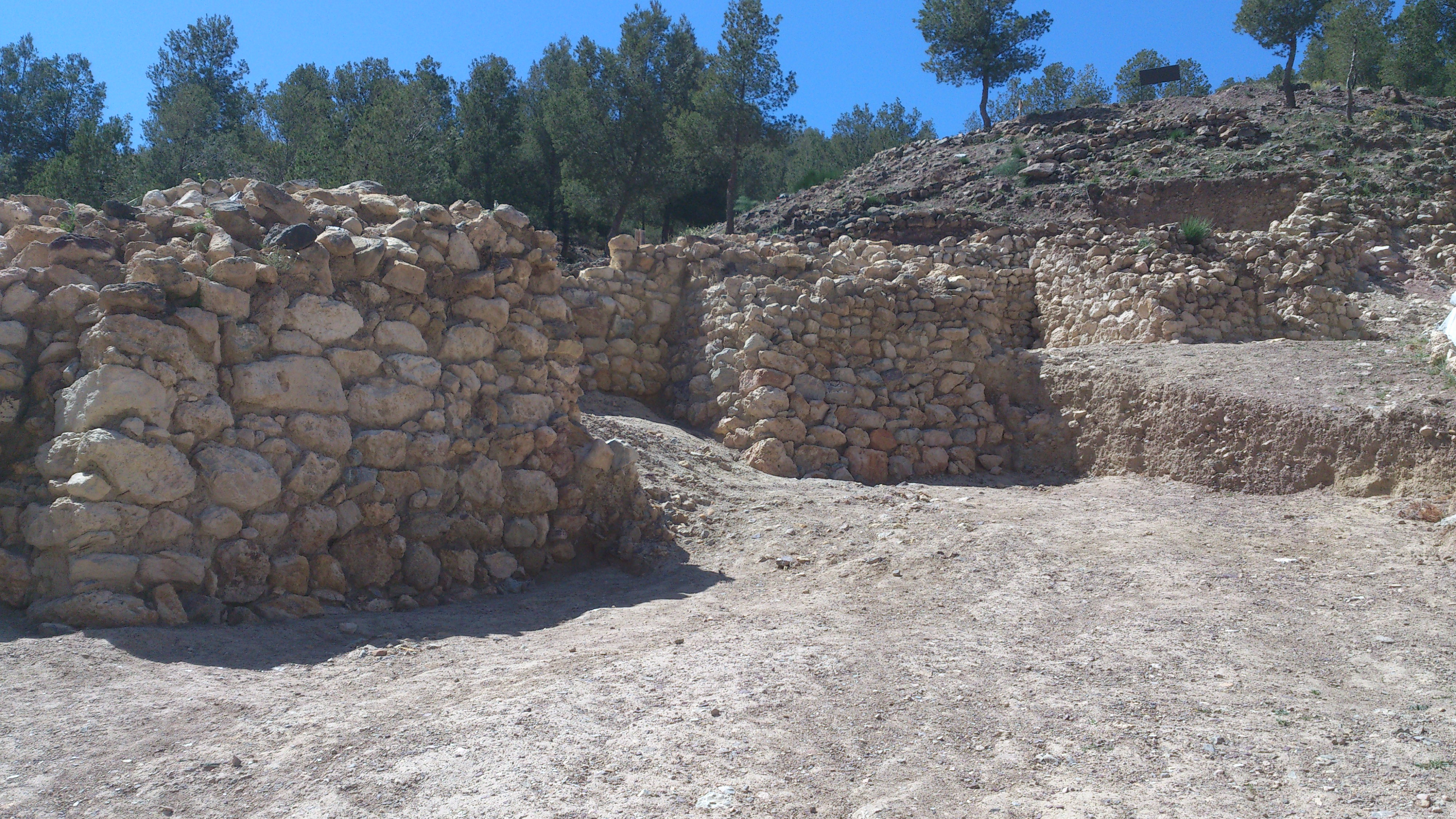 Estado de excavación en abril de 2013 de la muralla del yacimiento arqueológico La Bastida de Totana.